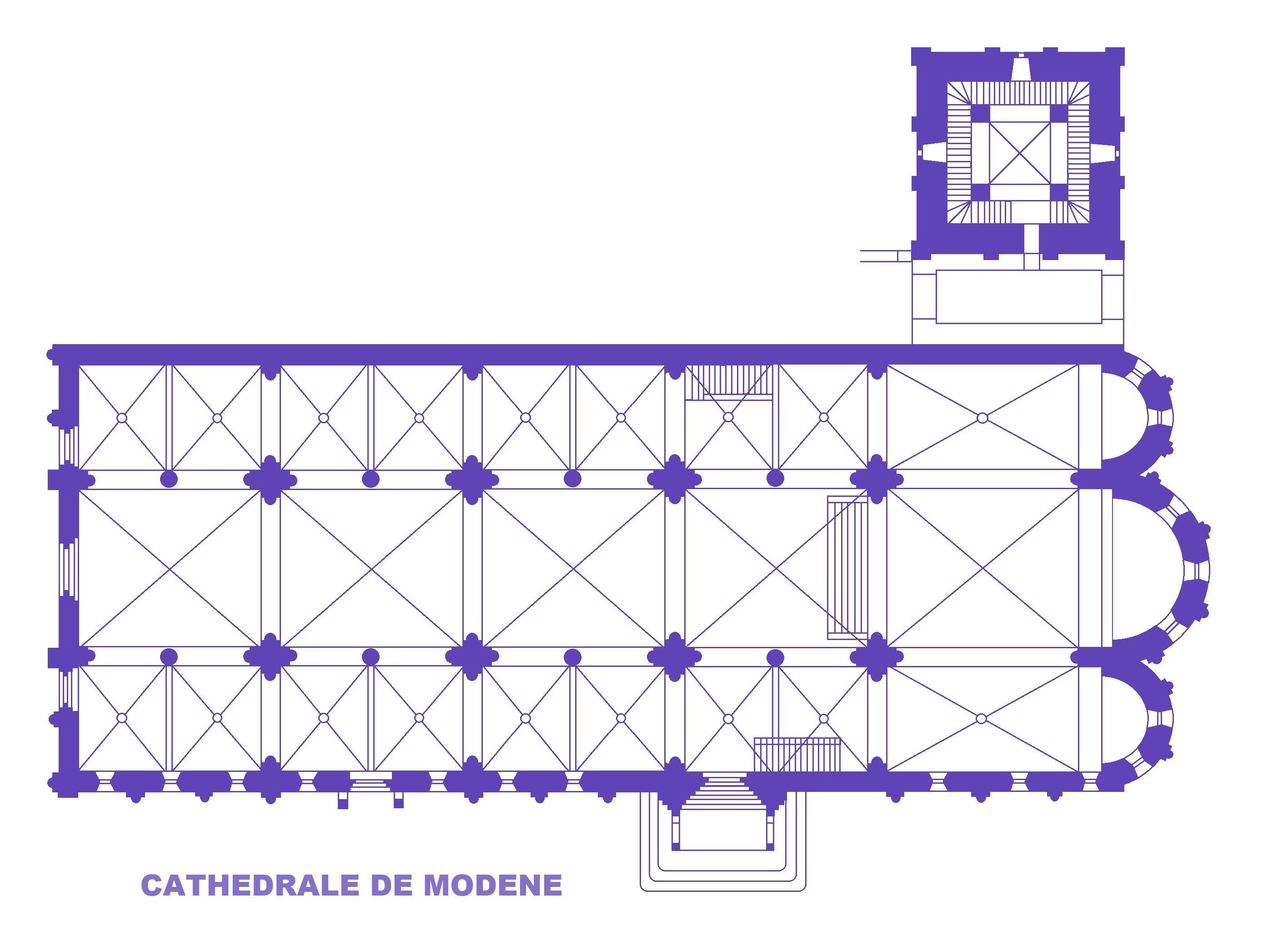 Cathédrale de Modène, Plan